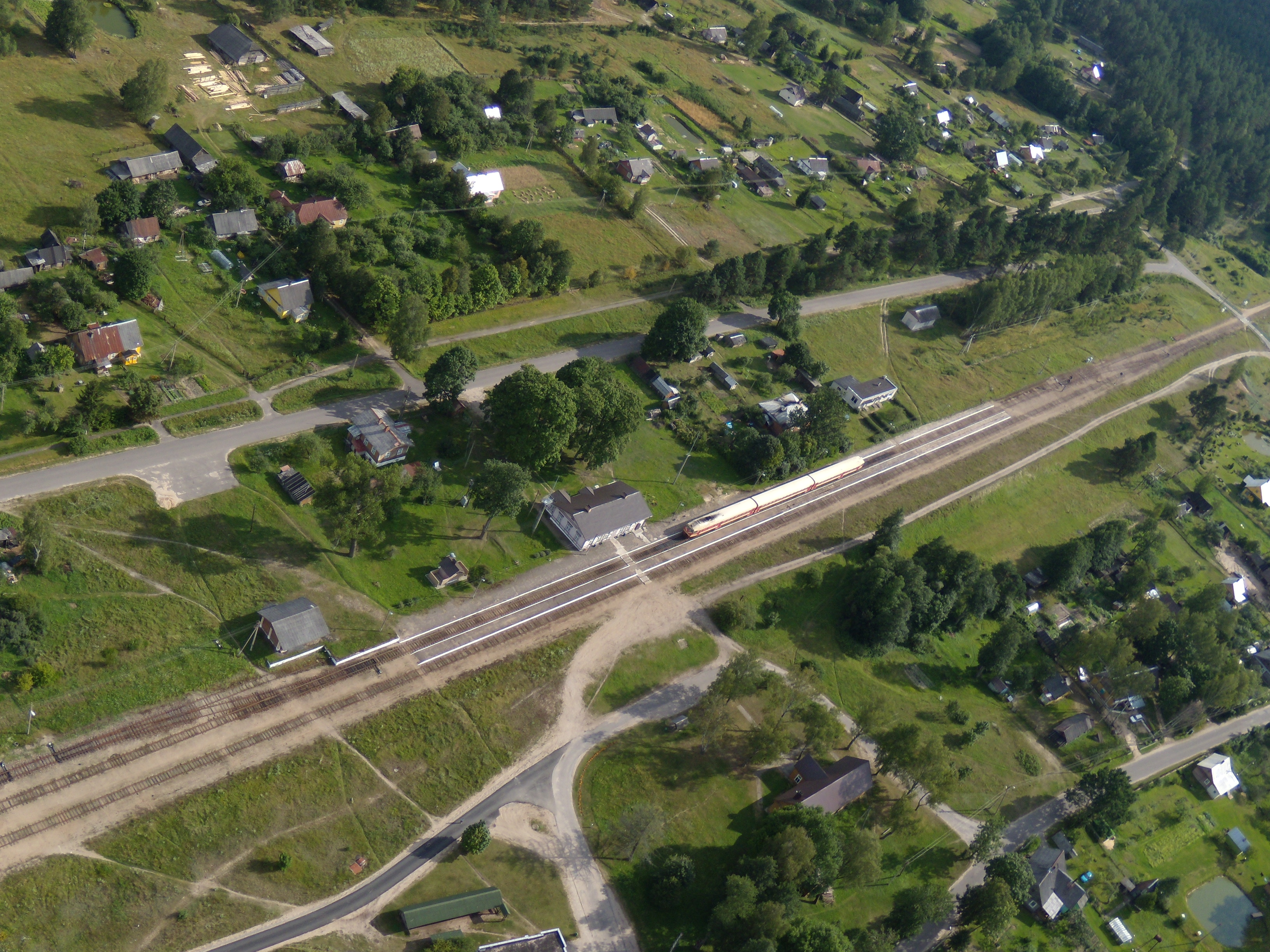 Marcinkonių geležinkelio stotis. Autorius Arūnas Gineitis.